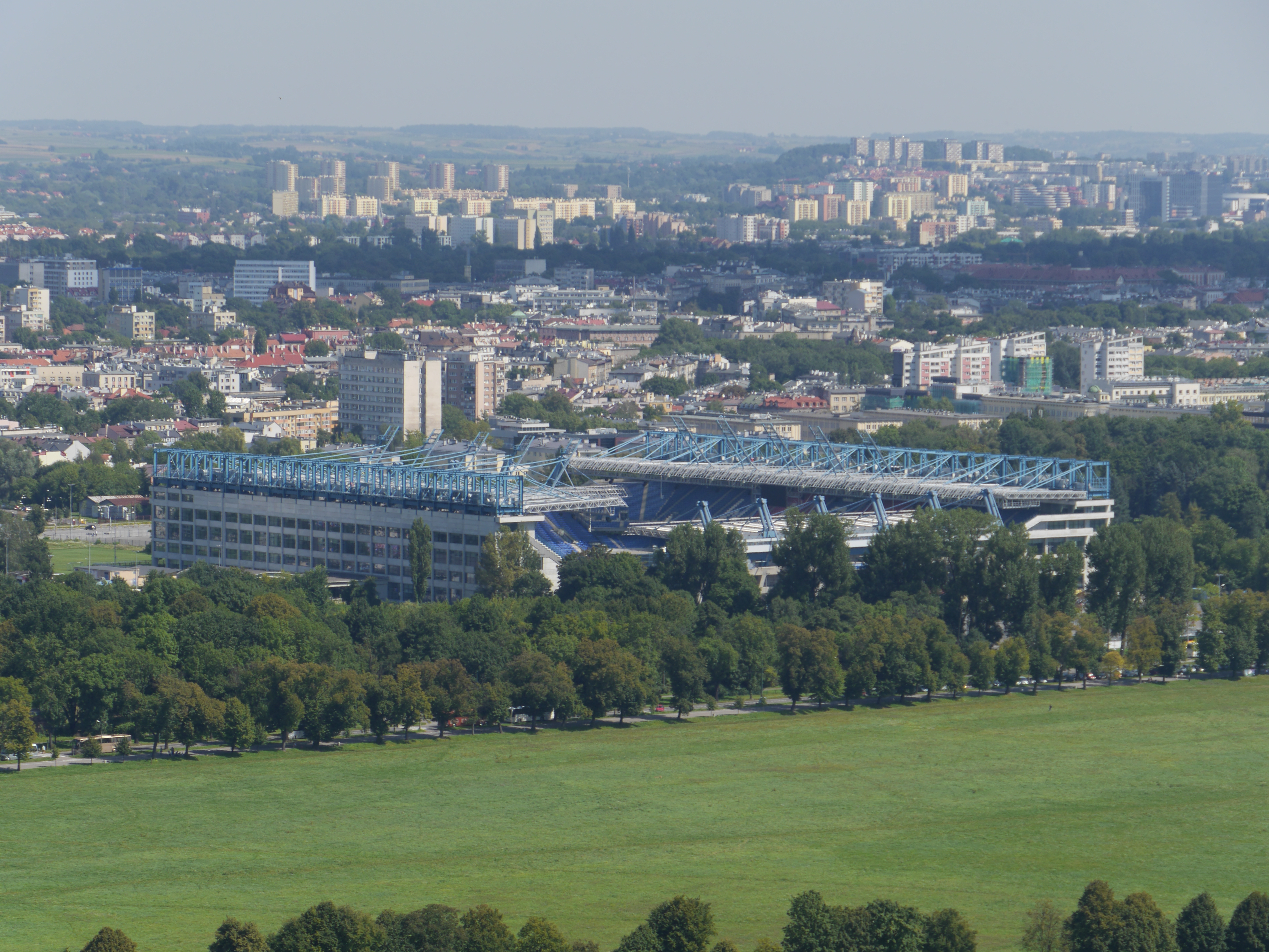 Stadion Miejski w Krakowie This photo was taken with Panasonic Lumix DMC-GH3 camera, thanks to Panasonic. You can see all photographs in category: Taken with Panasonic Lumix DMC-GH3.